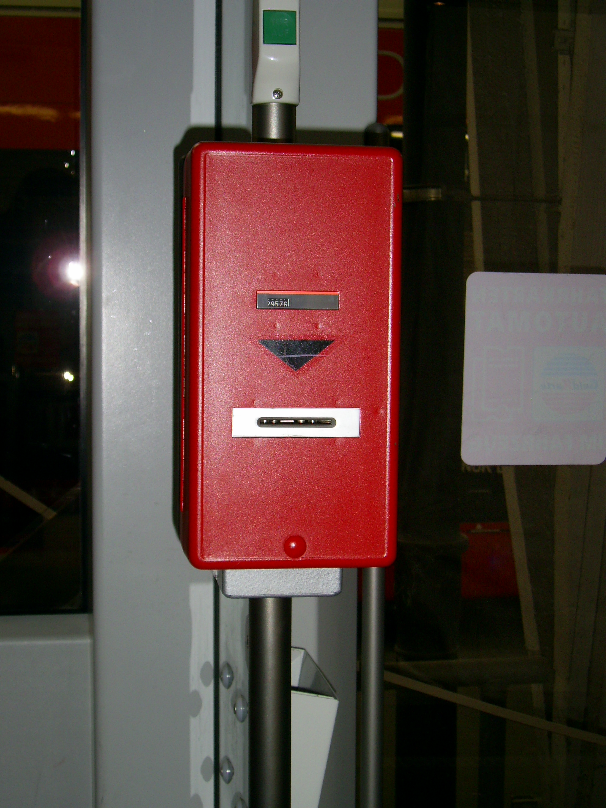 Strassenbahn Halle Fahrscheinentwerter